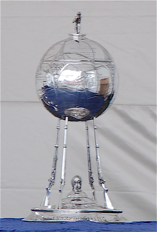 Officerspokalen